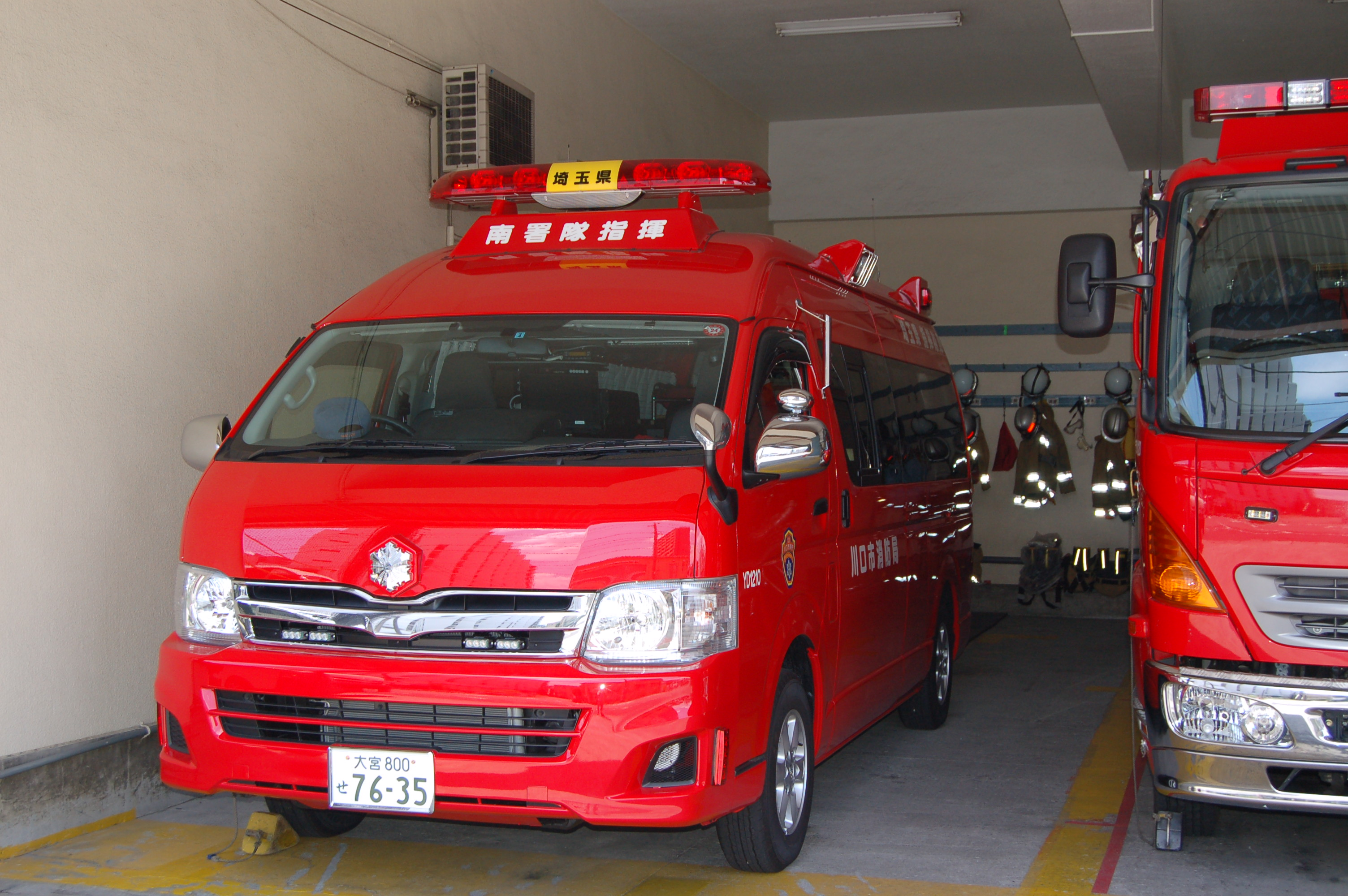 川口市消防局南消防署指揮1(緊急消防援助隊埼玉県隊指揮車)